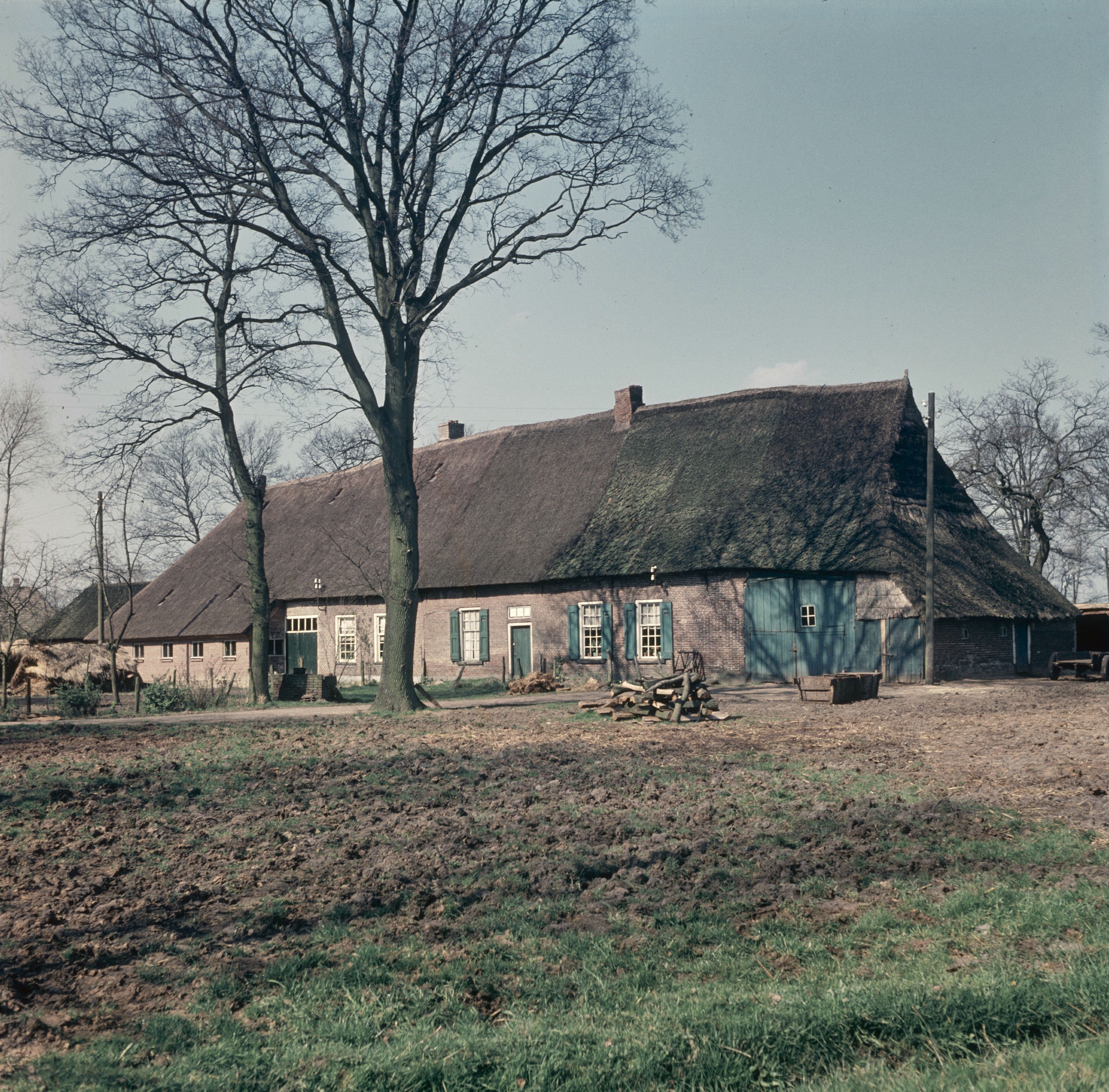 Boerderij E 3: Overzicht boerderij